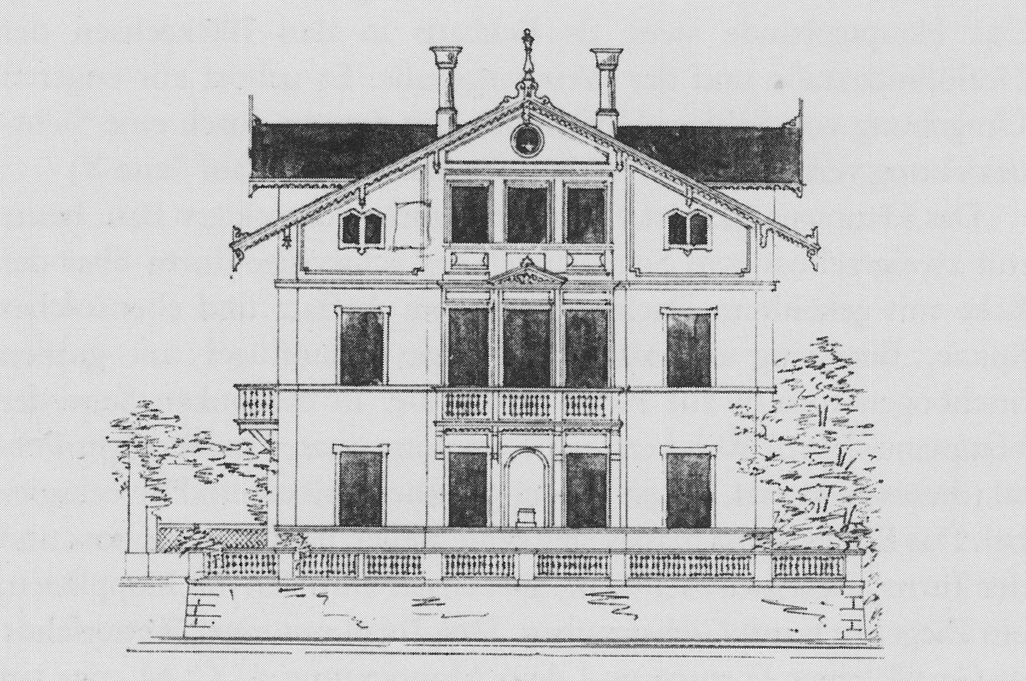 Radebeul, Haus Jordan, Bauzeichnung